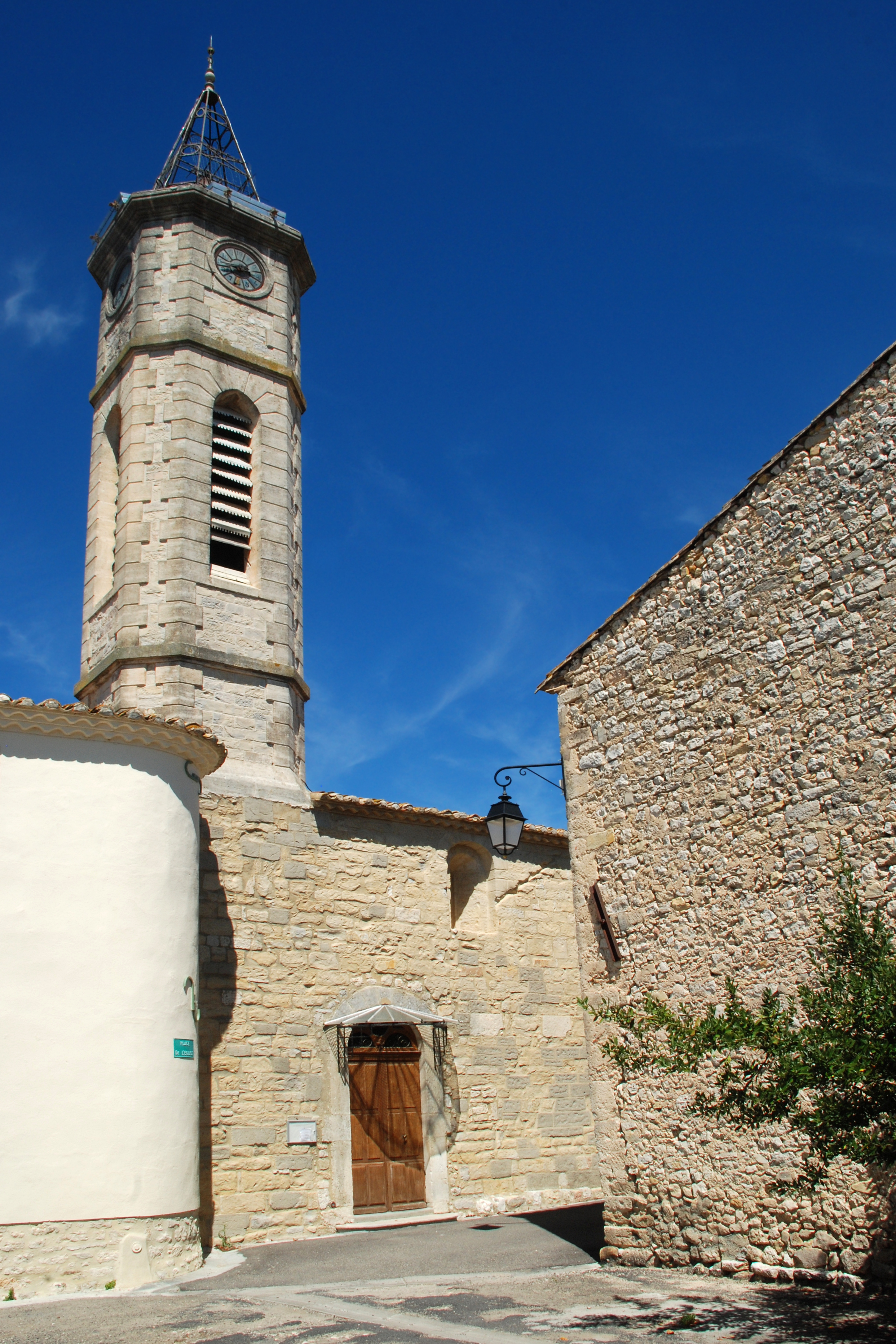 France - Hérault - Église de Saint-Hilaire-de-Beauvoir